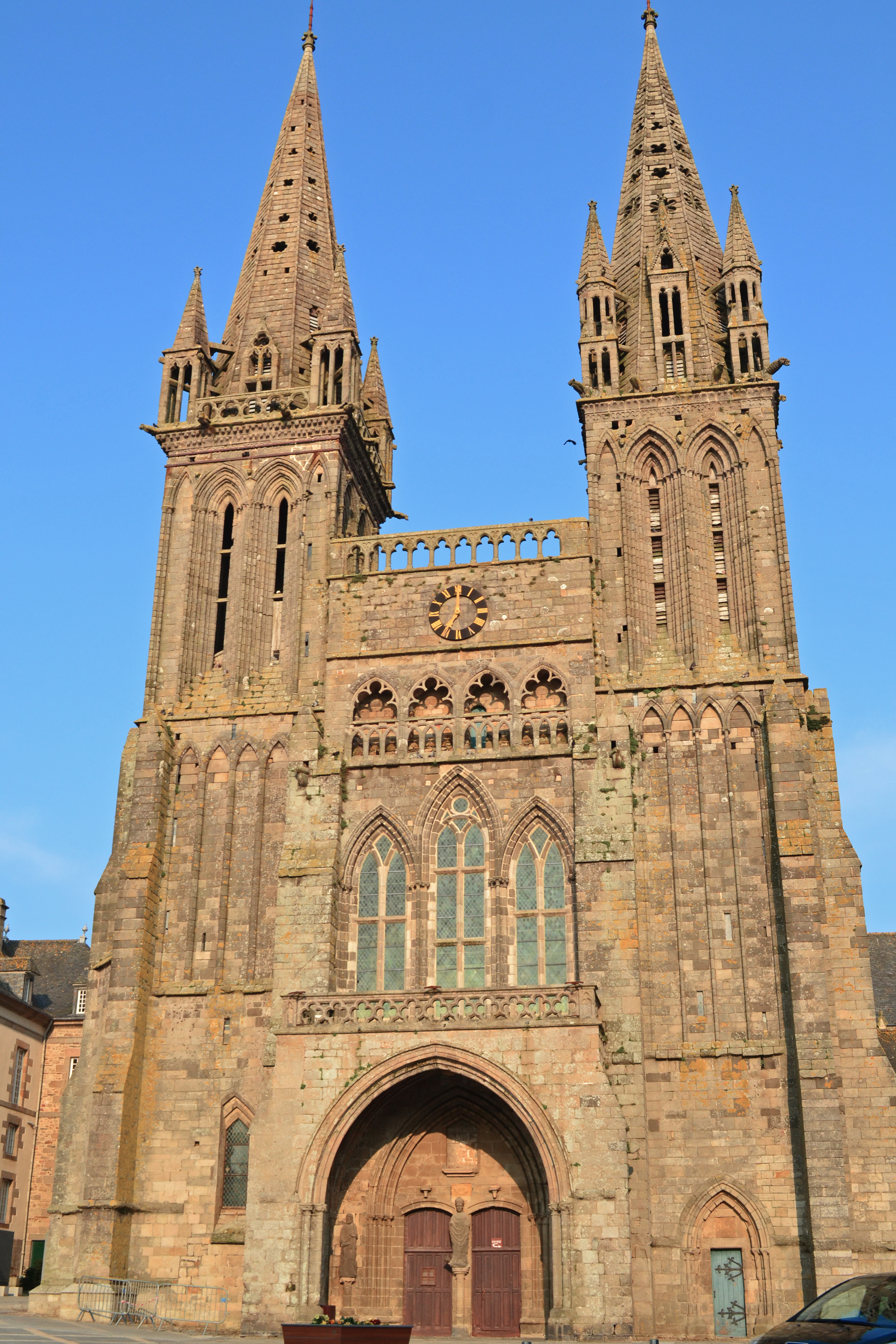 Façade de la cathédrale Saint-Paul-Aurélien à Saint-Pol-de-Léon.